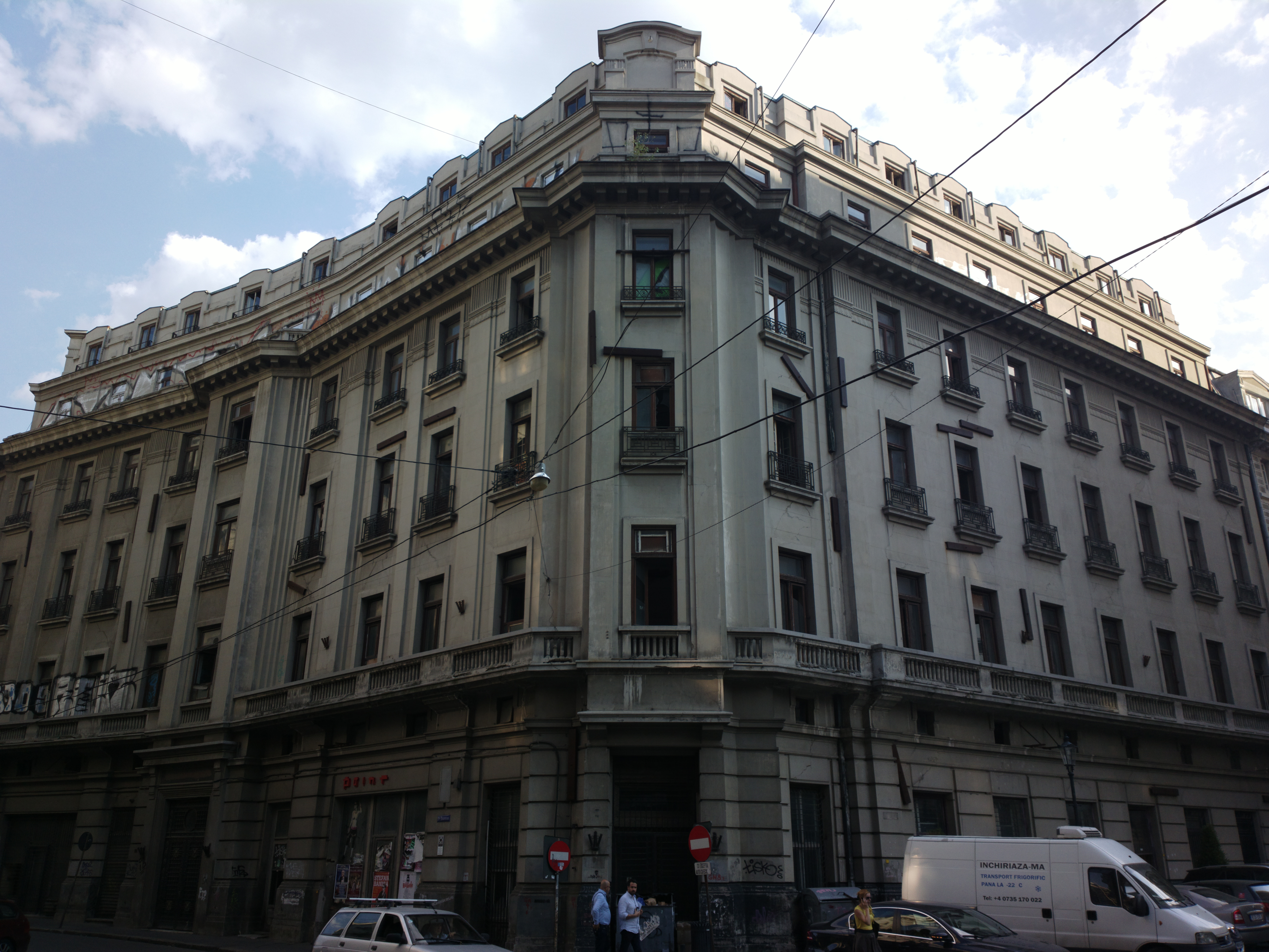 Sediu Bancă